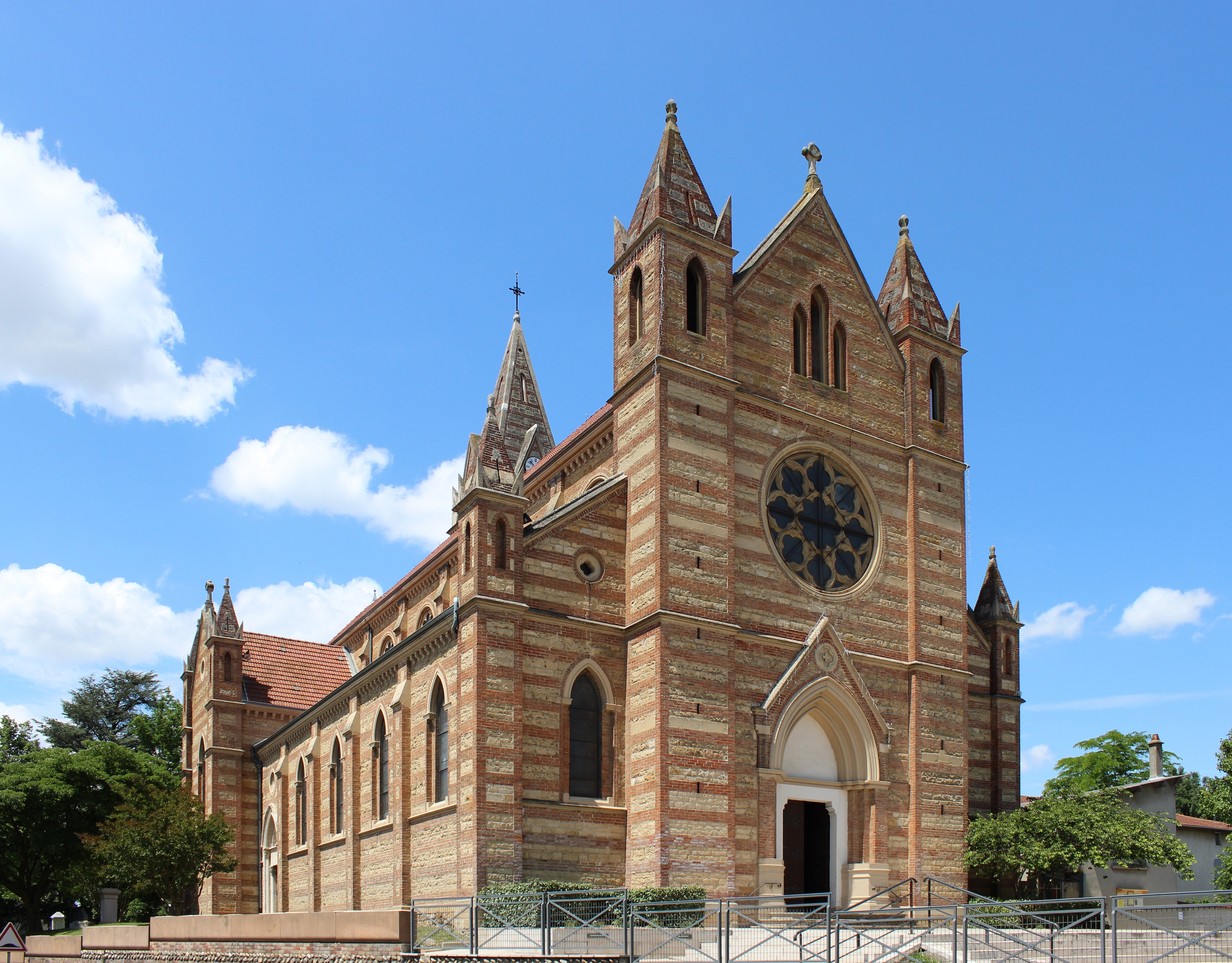 Église Saint-Barthélemy à Genas.